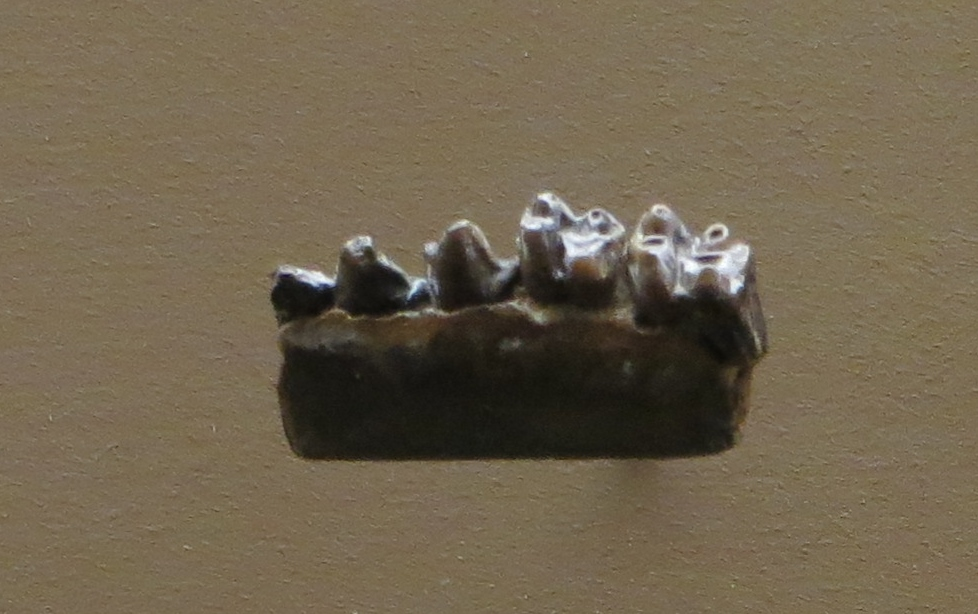 Fossil of Meniscodon - Took the picture at Natural History Museum, Basel